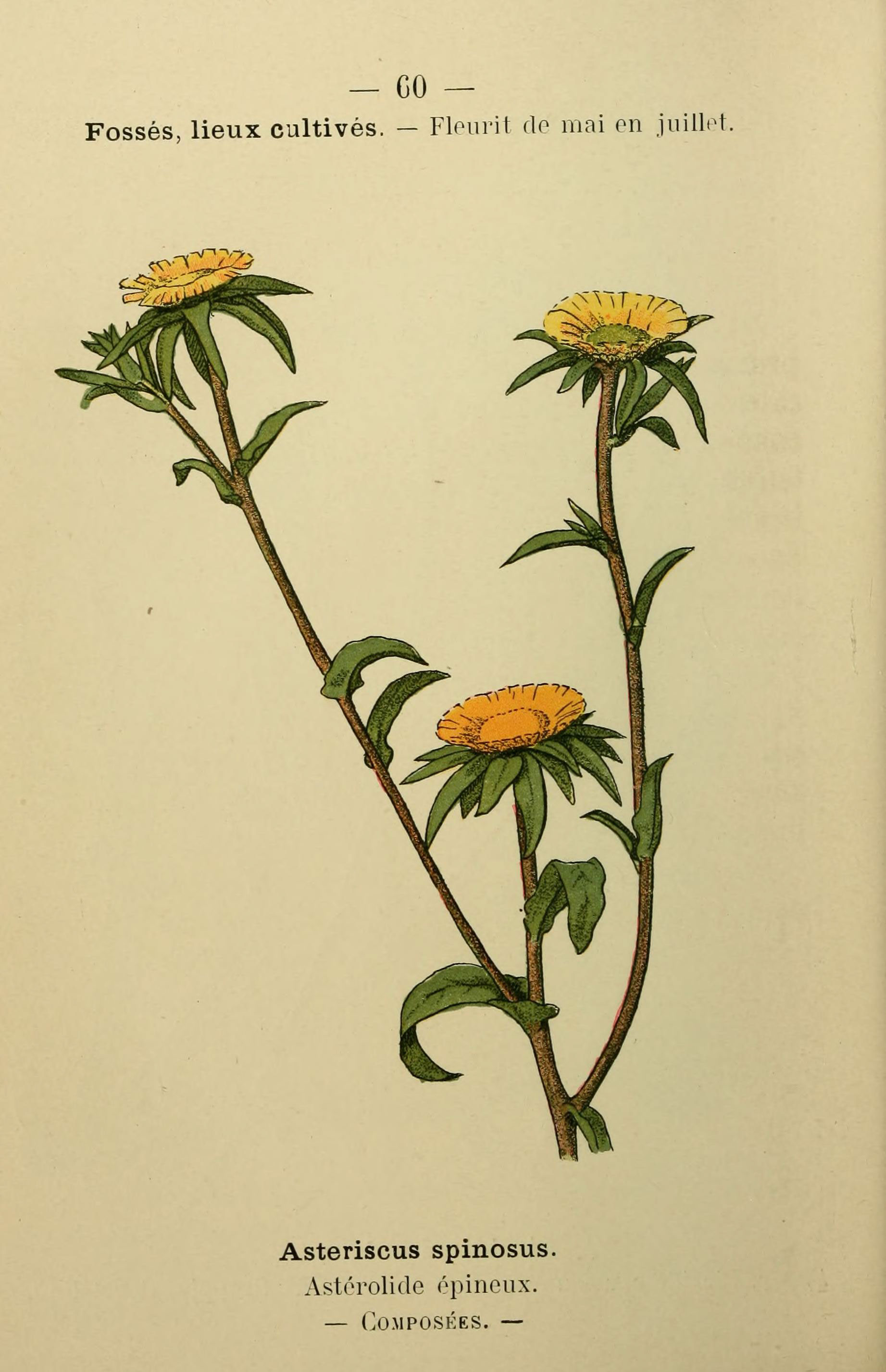 — GO — Fossés, lieux cultivés. - Floiirit do mai en juillet. Asteriscus spinosus. Astérolide épineux. — COMPOSKES. —